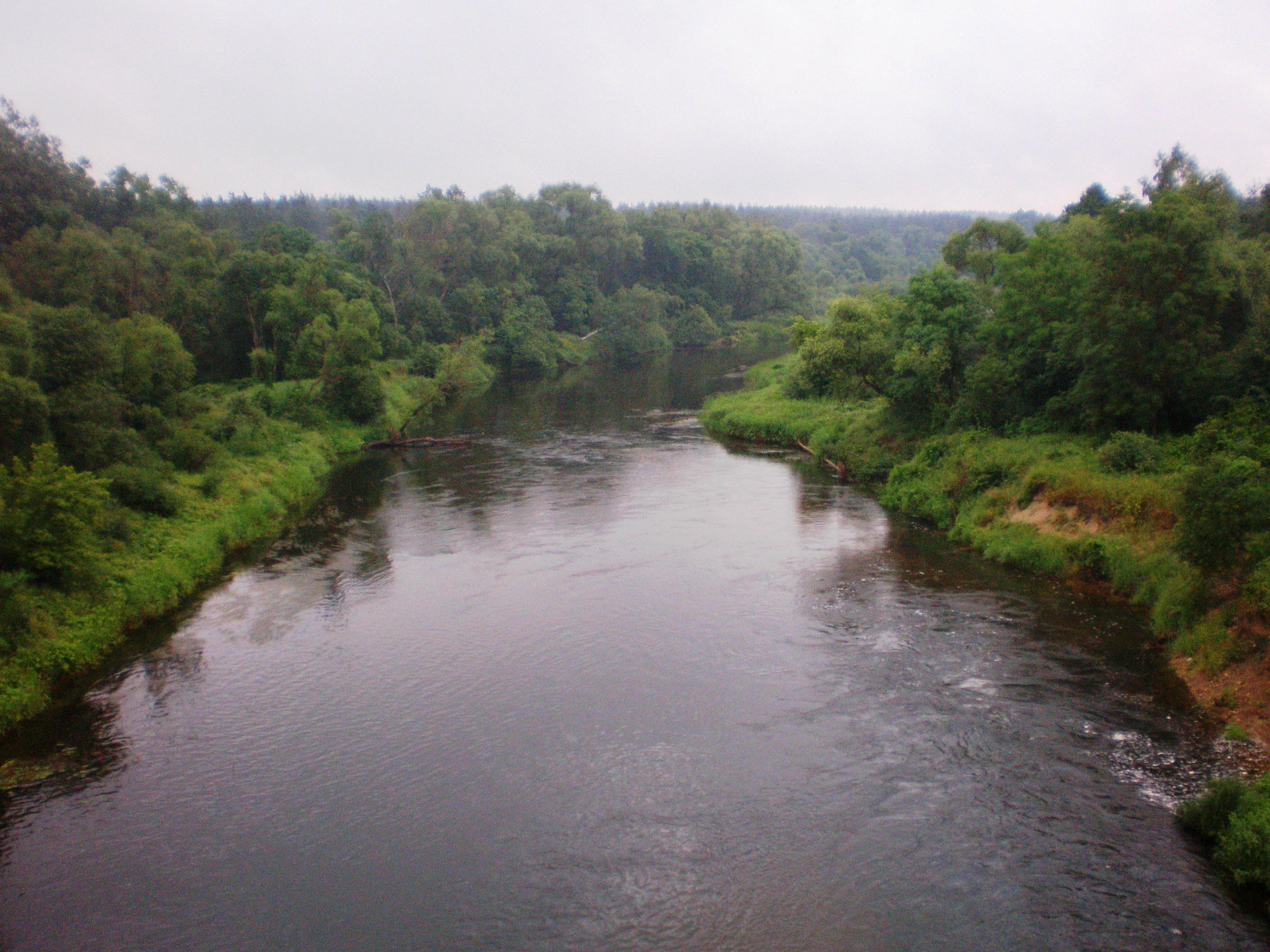 Šventoji river near Šventupė